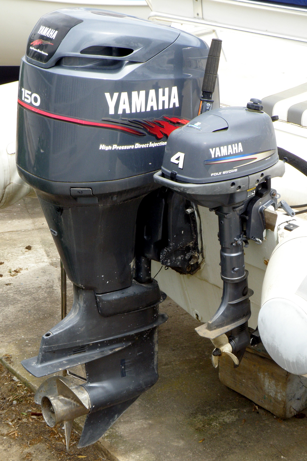 Außenbordmotoren der Firma Yamaha am Heck eines Bootes.